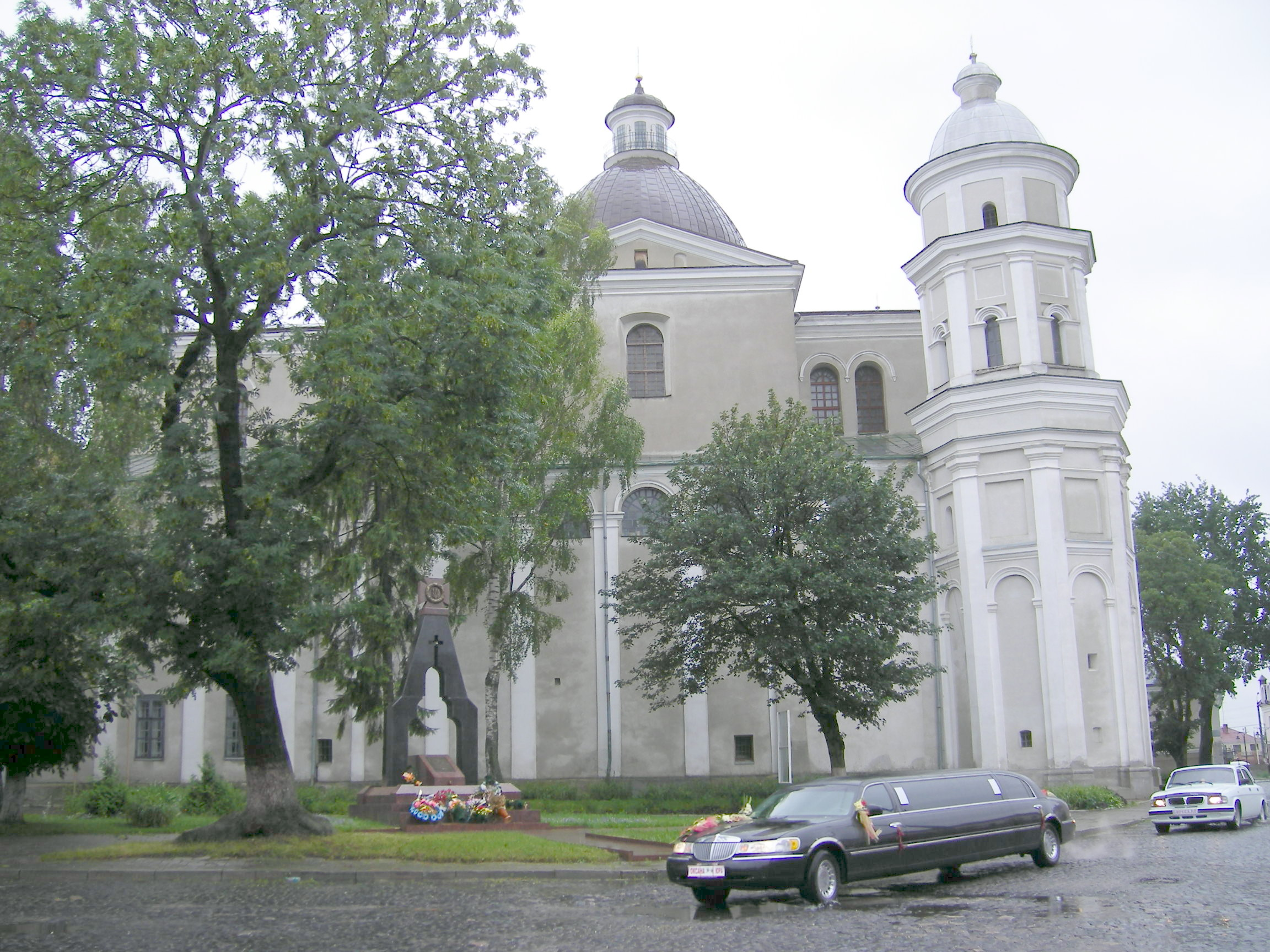 Lutsk, Petropavlovskyy Cathedral